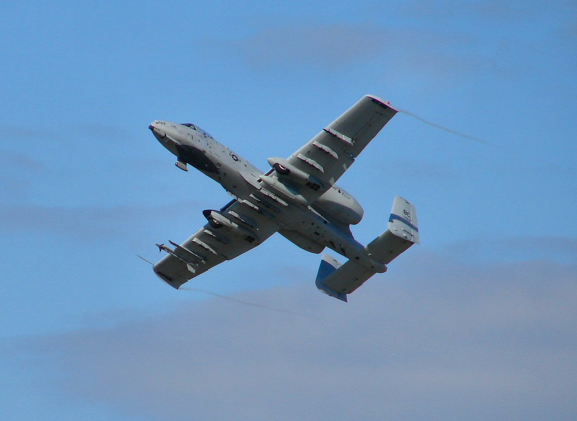 Departing Volk Field Fly-In and Open House 2006.